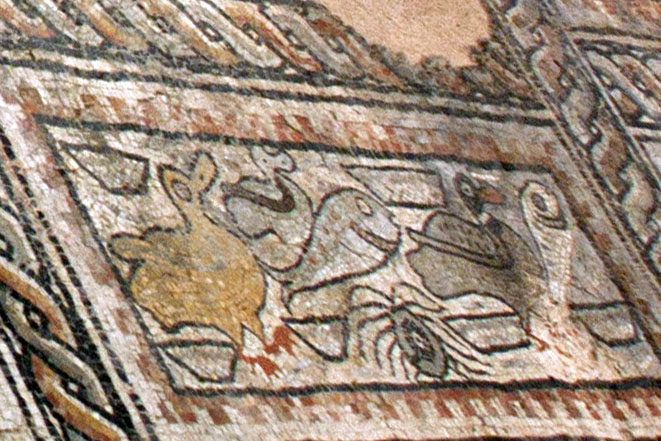 Mosaïque du Dieu Océan du domaine de Saint-Girons, Espace-Muséographique de Maubourguet, Maubourguet, Hautes-Pyrénées, France